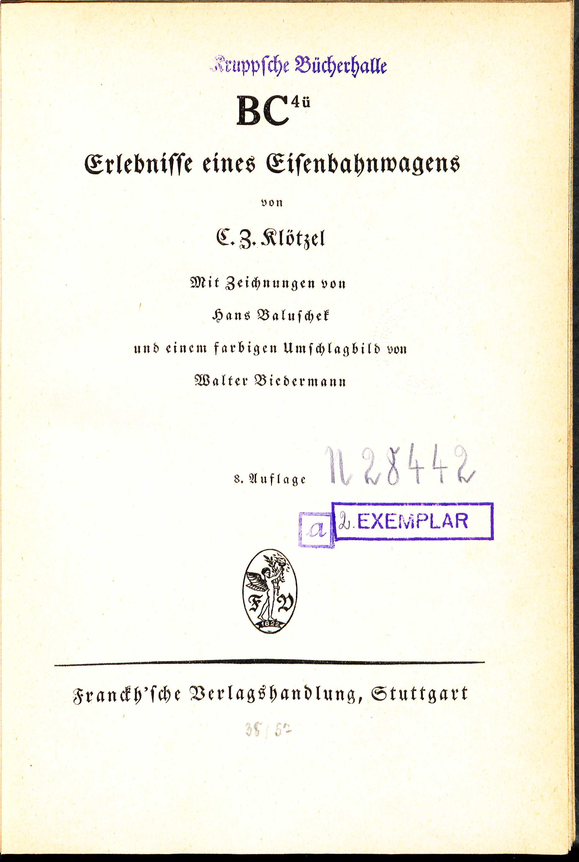 C. Z. Klötzel BC4ü Titelblatt